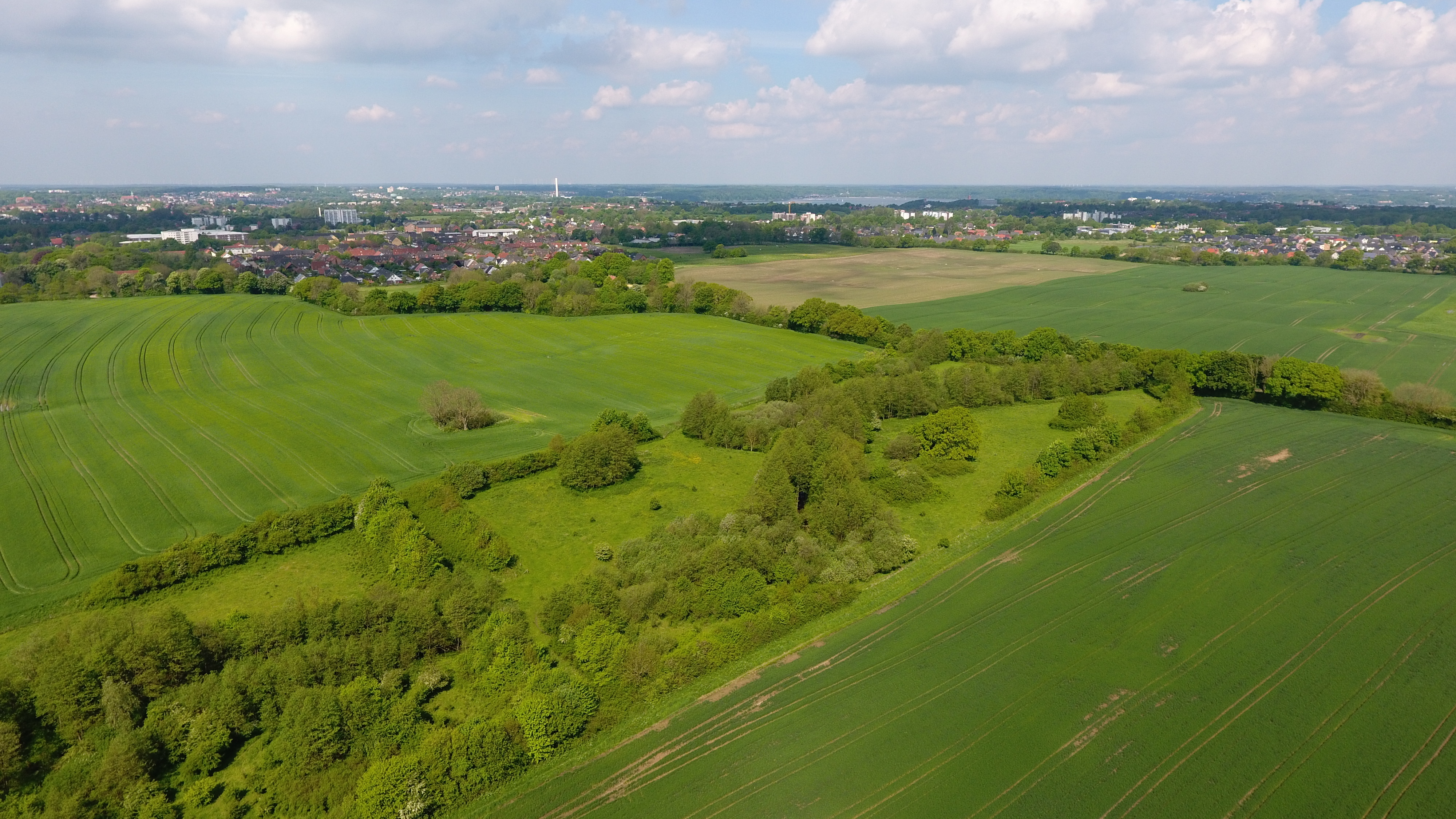 Blick auf ein Waldstück mit kleinem Bach im Landschaftsschutzgebiet Vogelsang.